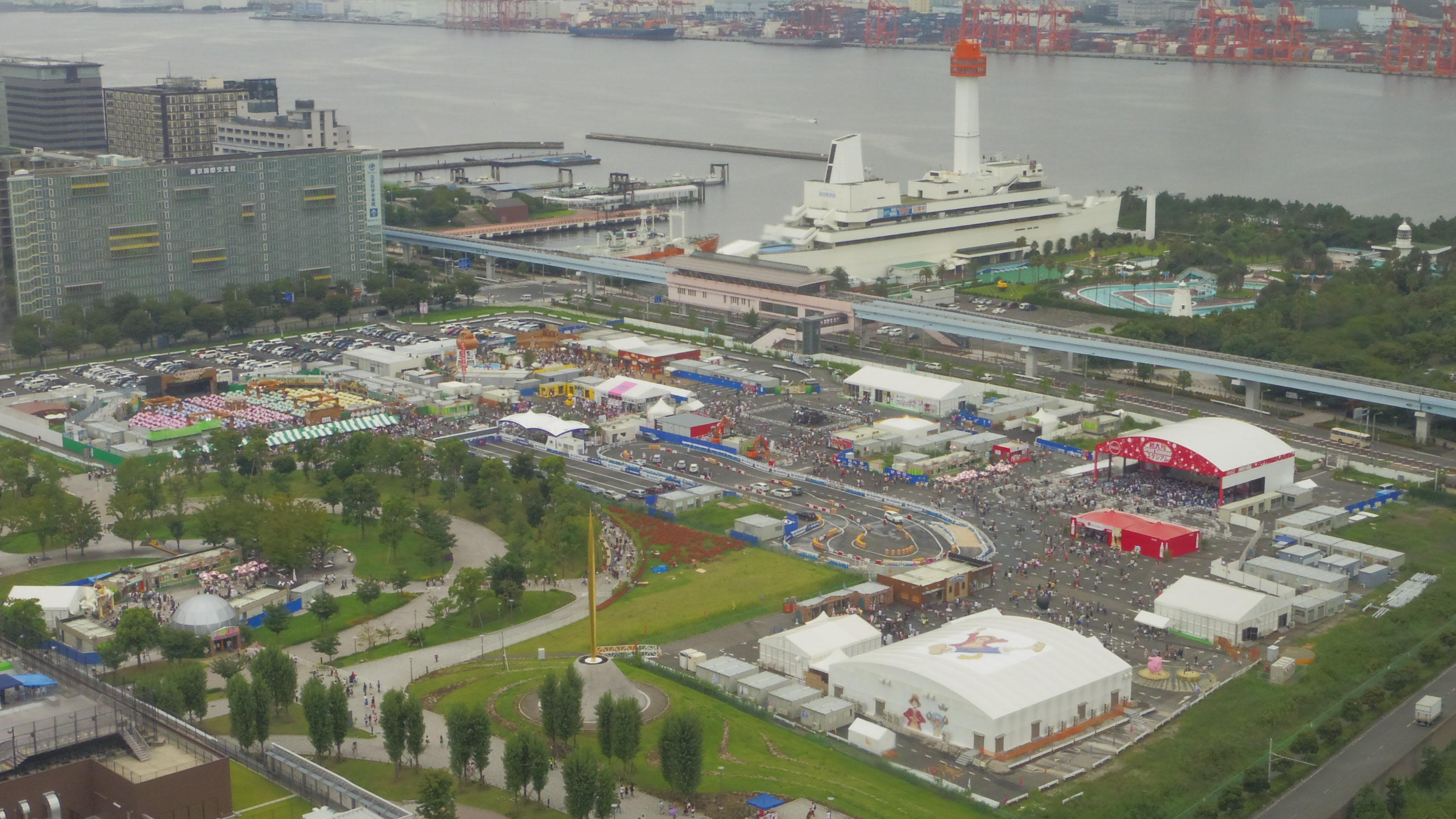 フジテレビの夏イベント『お台場新大陸』（2014年）の「新大陸ドキドキランド」。フジテレビ本社FCGビル24階より撮影。